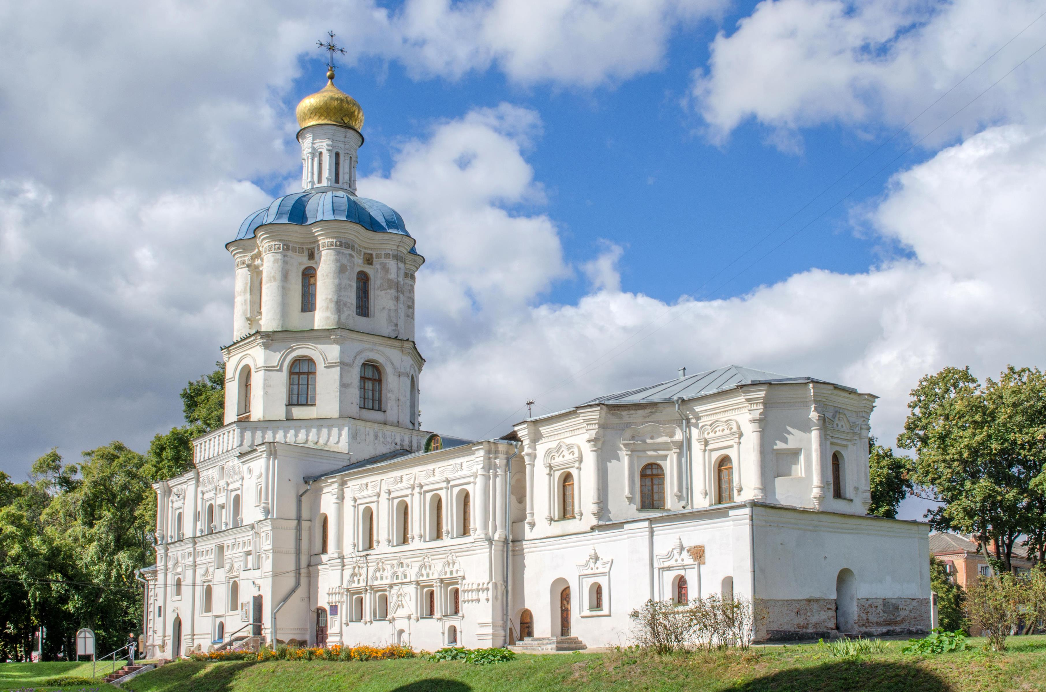 Колегіум (мур.), Чернігів, вул.Спасо-Преображенська, 1